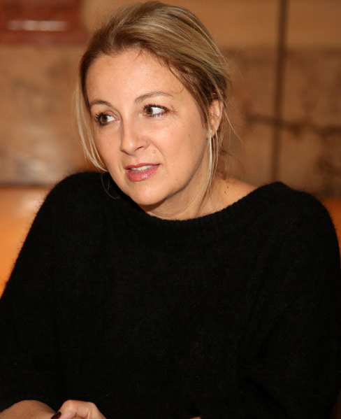 Euke Frank beim JournalistInnenkongrss 2014 im Haus der Industrie